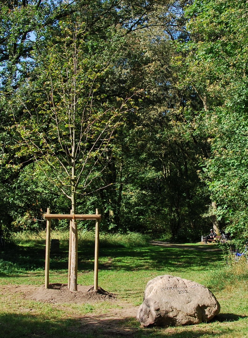 Fotografie der neu gepflanzten Linde zur Erinnerung an Wilhelm Krasnapolsky im Peiner Herzberg